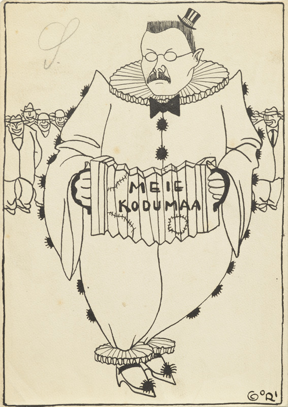 Meie kodumaa